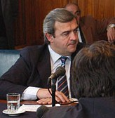 Jorge Larrañaga, Uruguayan senator.